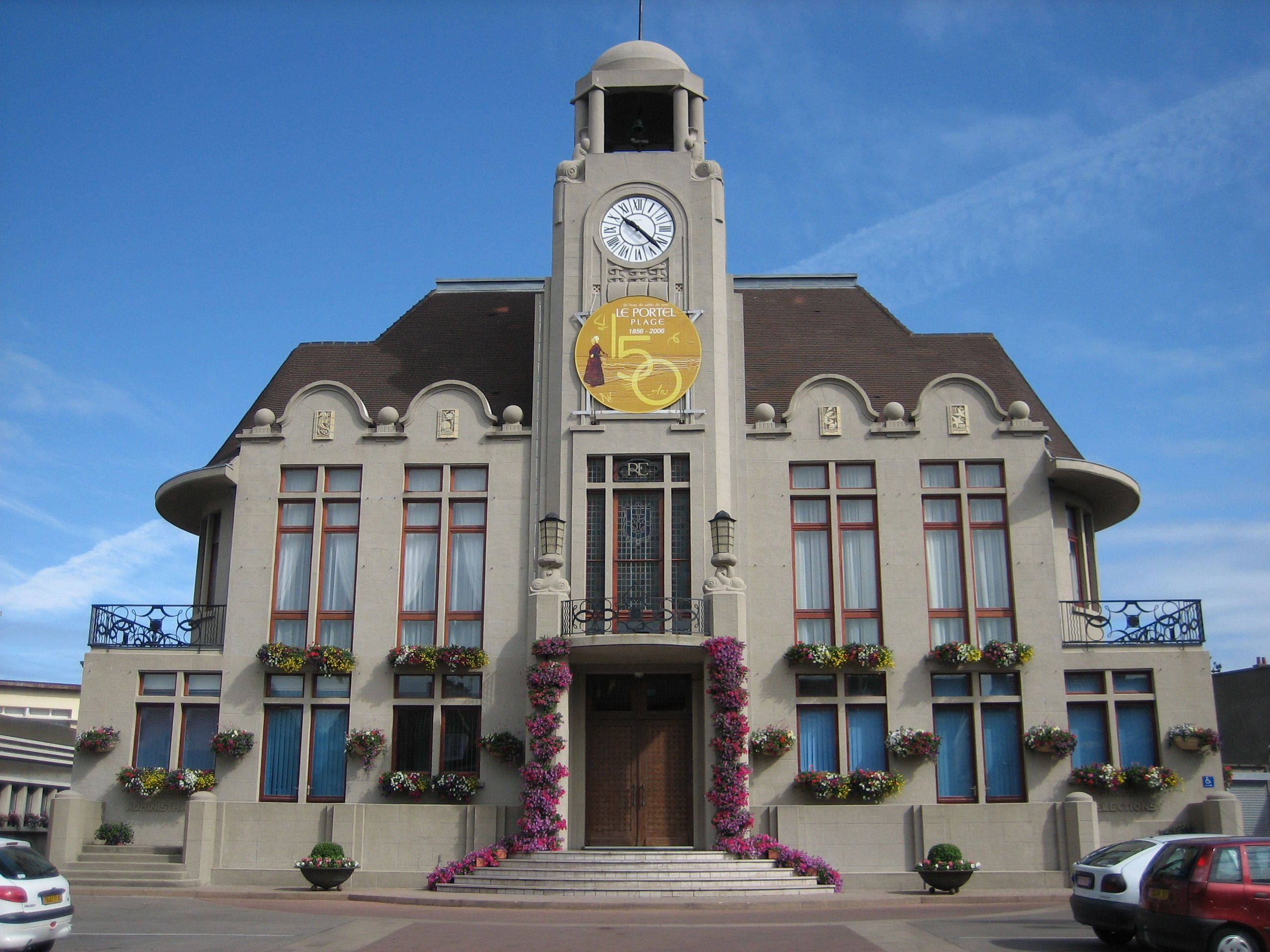 Mairie du Portel Plage - Cote d'Opale - France